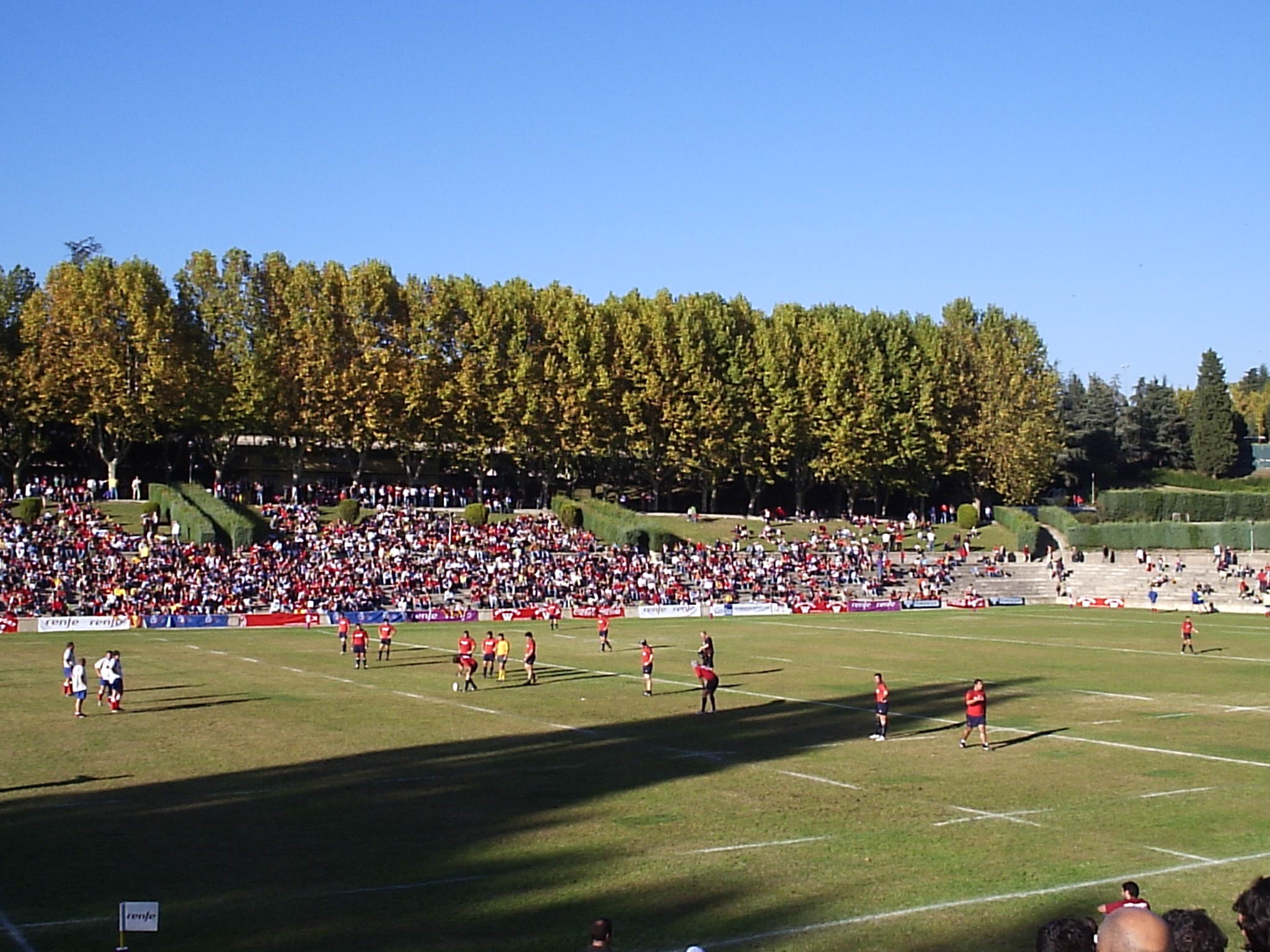 España contra la República Checa en Ciudad Universitaria